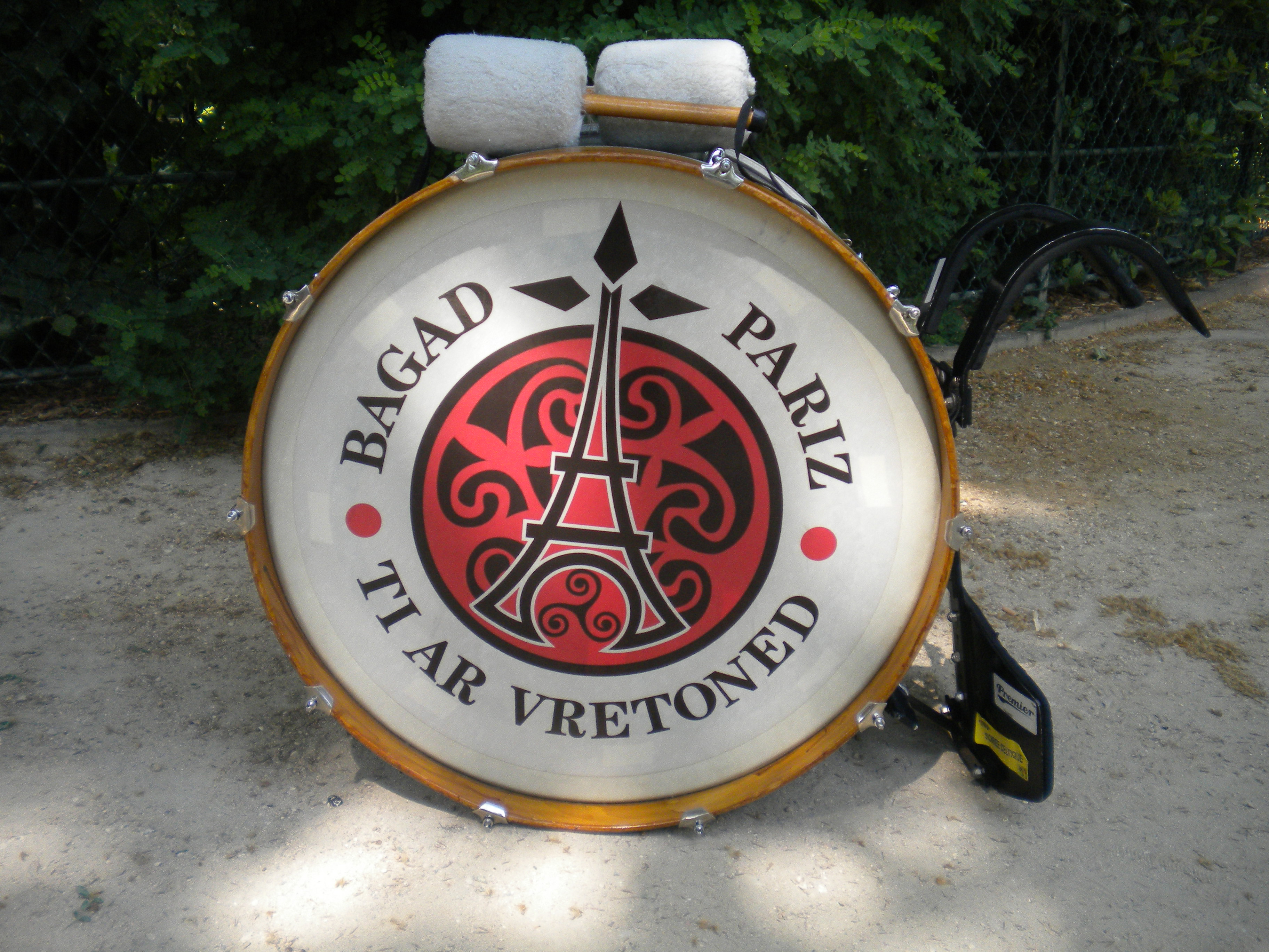 Gourdaboulin